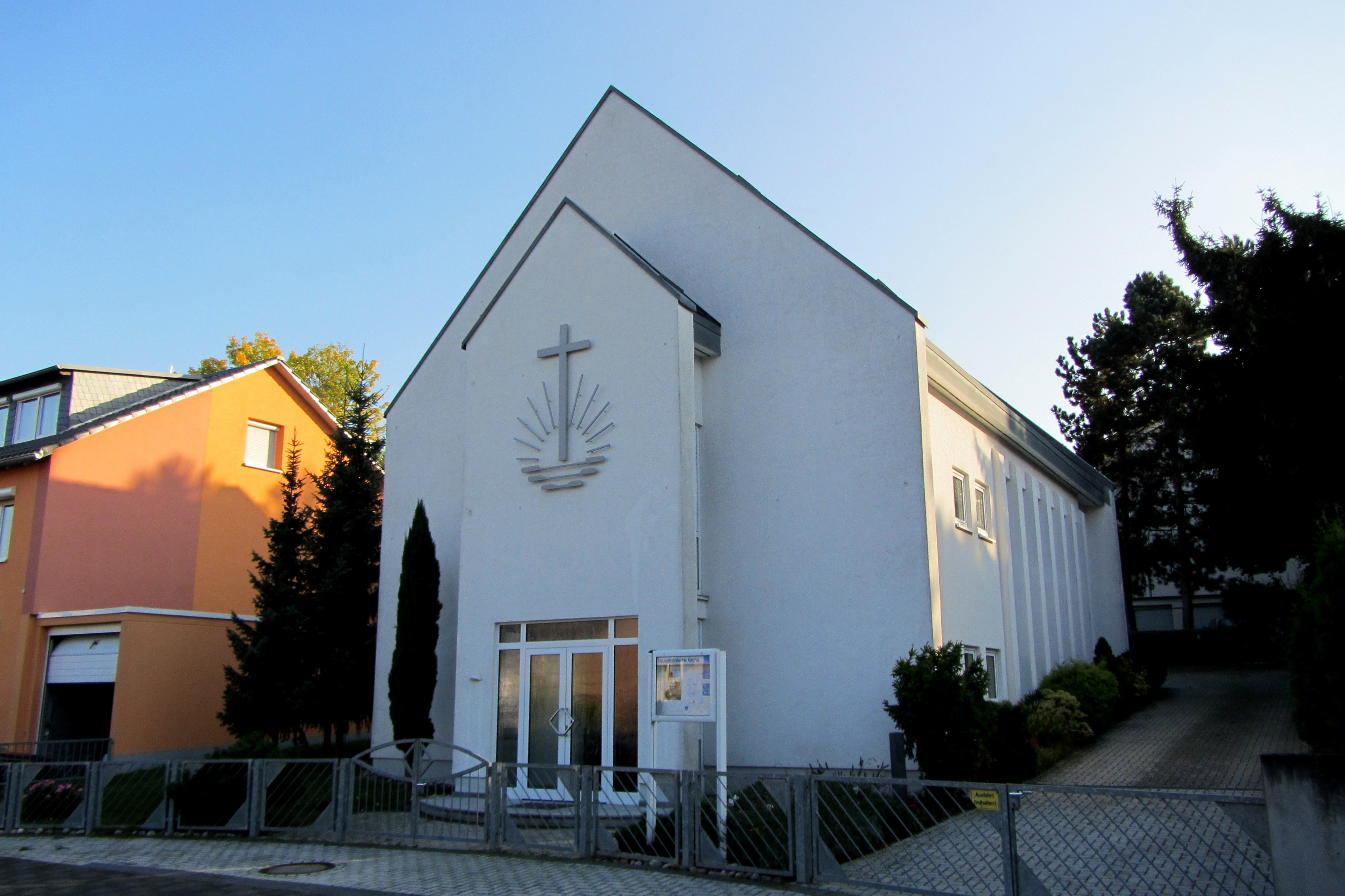 Die Neuapostolische Kirche in der Joseph Haydn Str in Bad Soden am Taunus